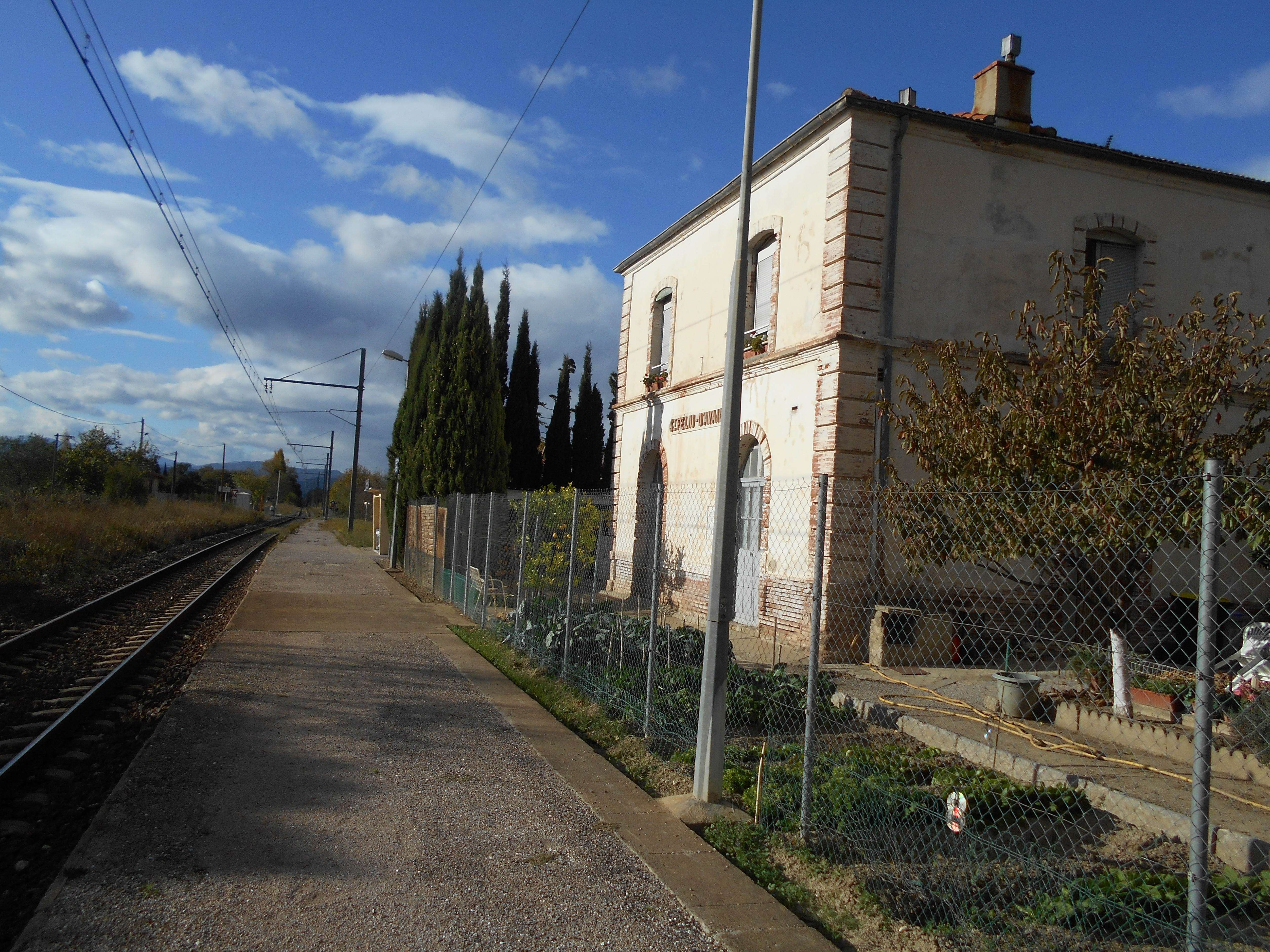 Estació de Sant Feliu d'Avall